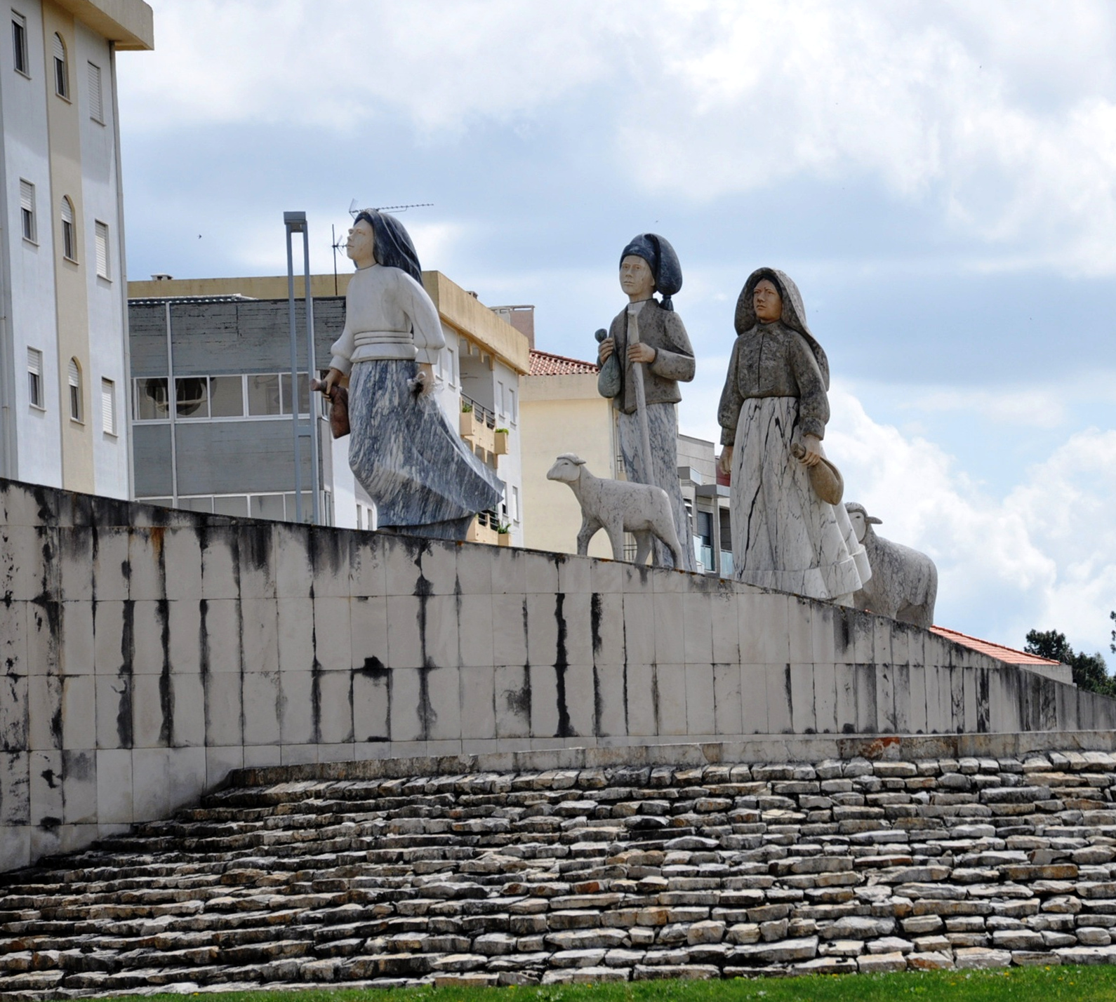 die Hirtenkinder